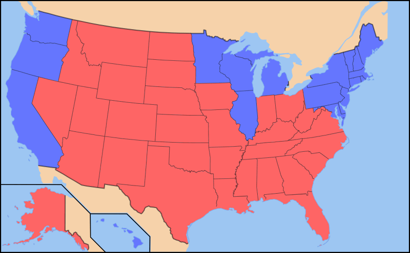 2004 US elections map